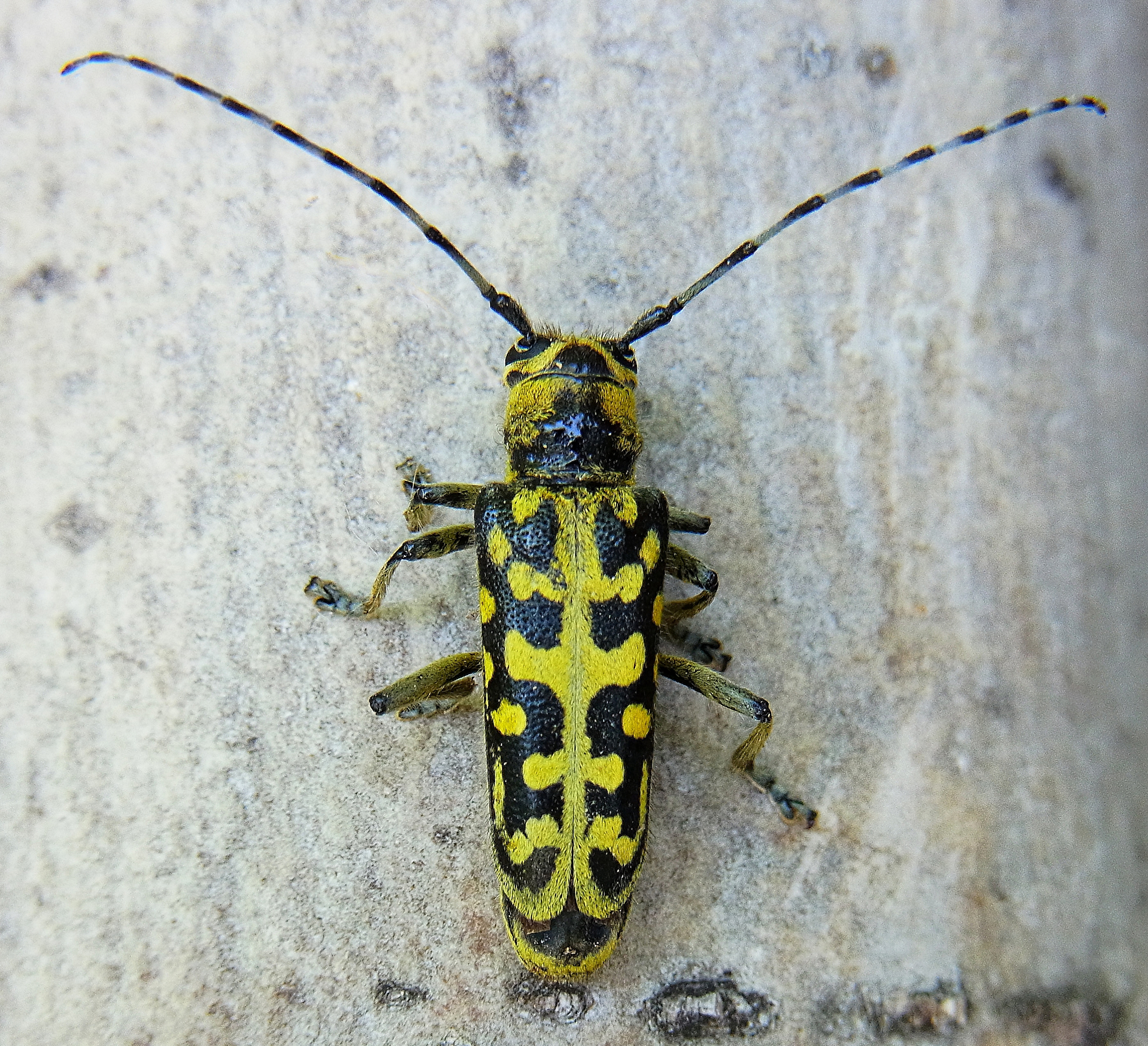 Saperda scalaris auf Pappelast Ungarn bei Mohacs am 12.5.2012